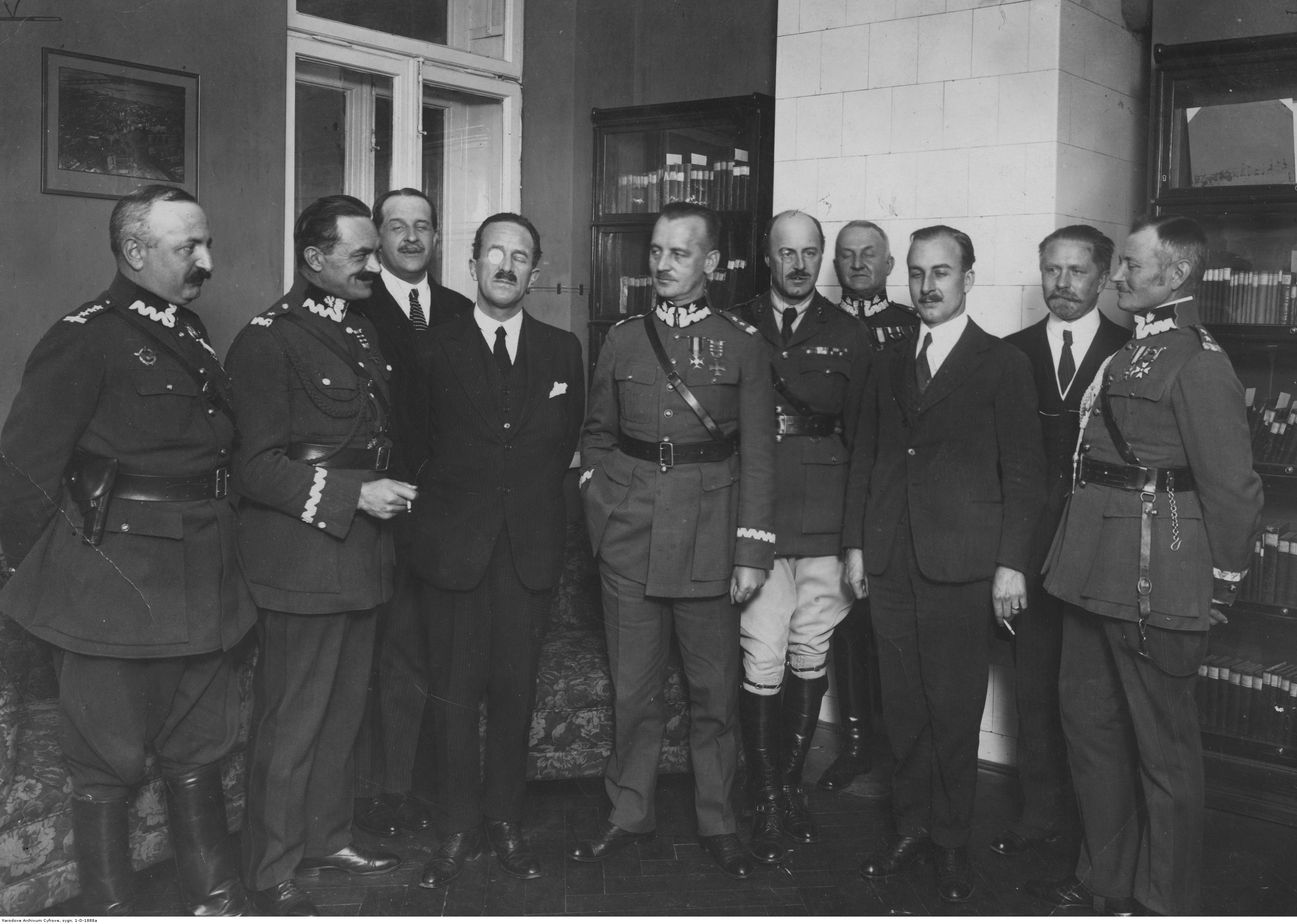 Wizyta w Polsce brytyjskiego podsekretarza do spraw lotnictwa Williama Brauckera; listopad 1924. Stoją od lewej: płk Antoni Buckiewicz, gen. Włodzimierz Zagórski, dyrektor Stefan Przeździecki, William Braucker, gen. Władysław Sikorski, attache Emil Clayton, gen. Stefan Suszyński, NN, dyrektor Witold Czapski, gen. Kazimierz Dzierżanowski. Koncern Ilustrowany Kurier Codzienny - Archiwum Ilustracji. Sygnatura: 1-D-1888a